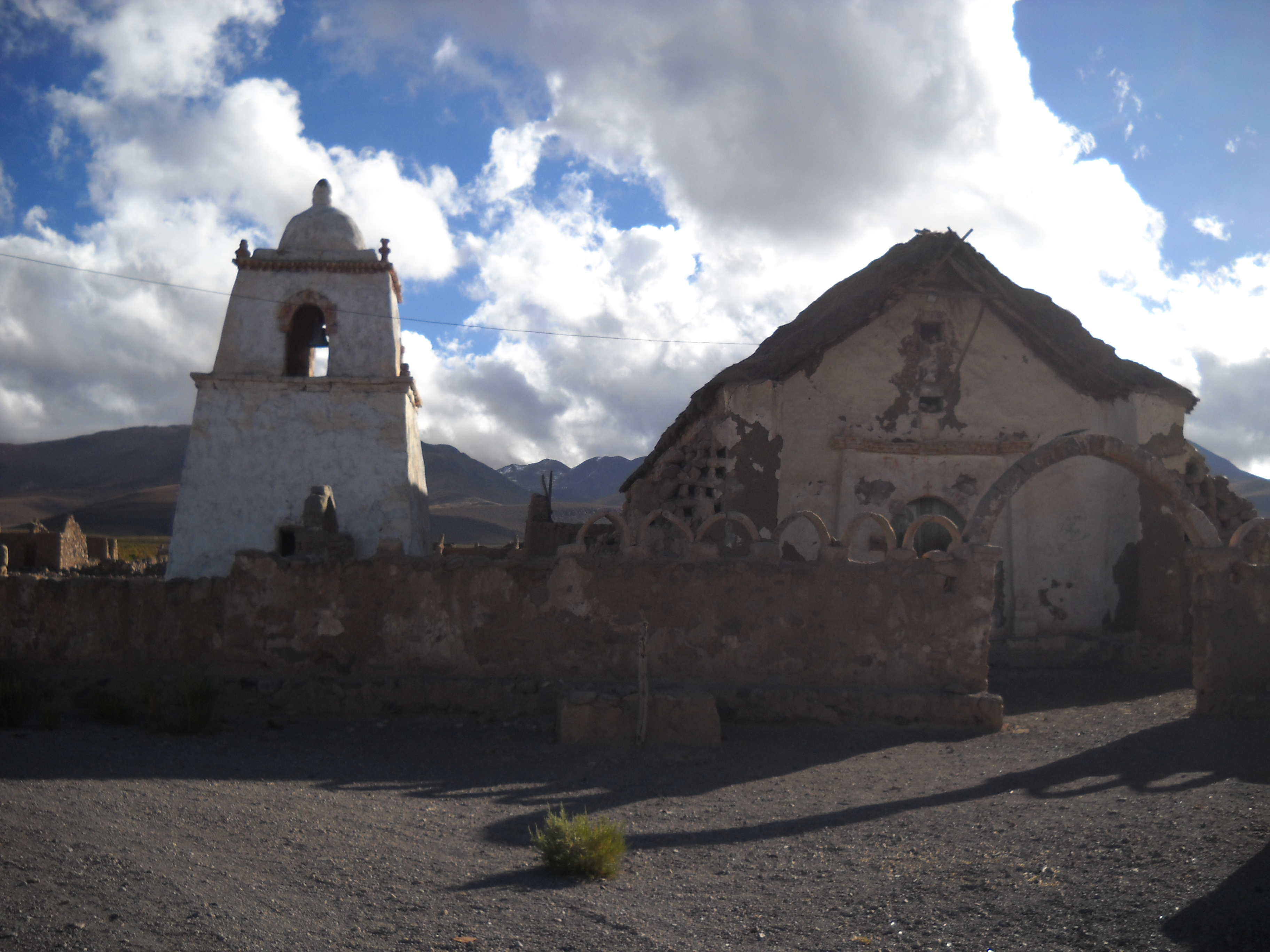 Iglesia de Mauque, monumento histórico nacional